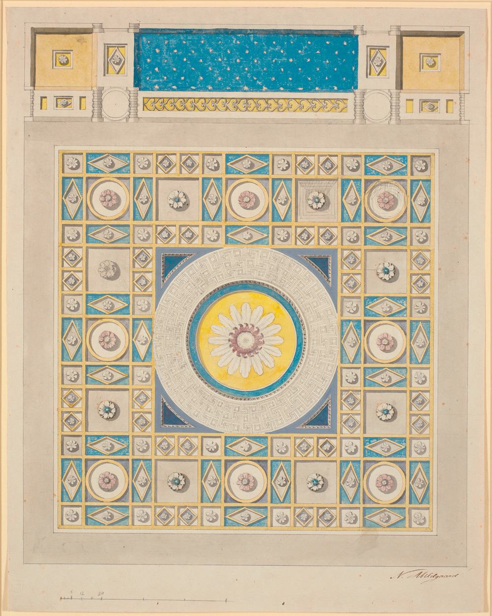 Nicolai Abildgaard (1743-1809), Loftet. Udkast til dekoration af audienssalen, 1790s